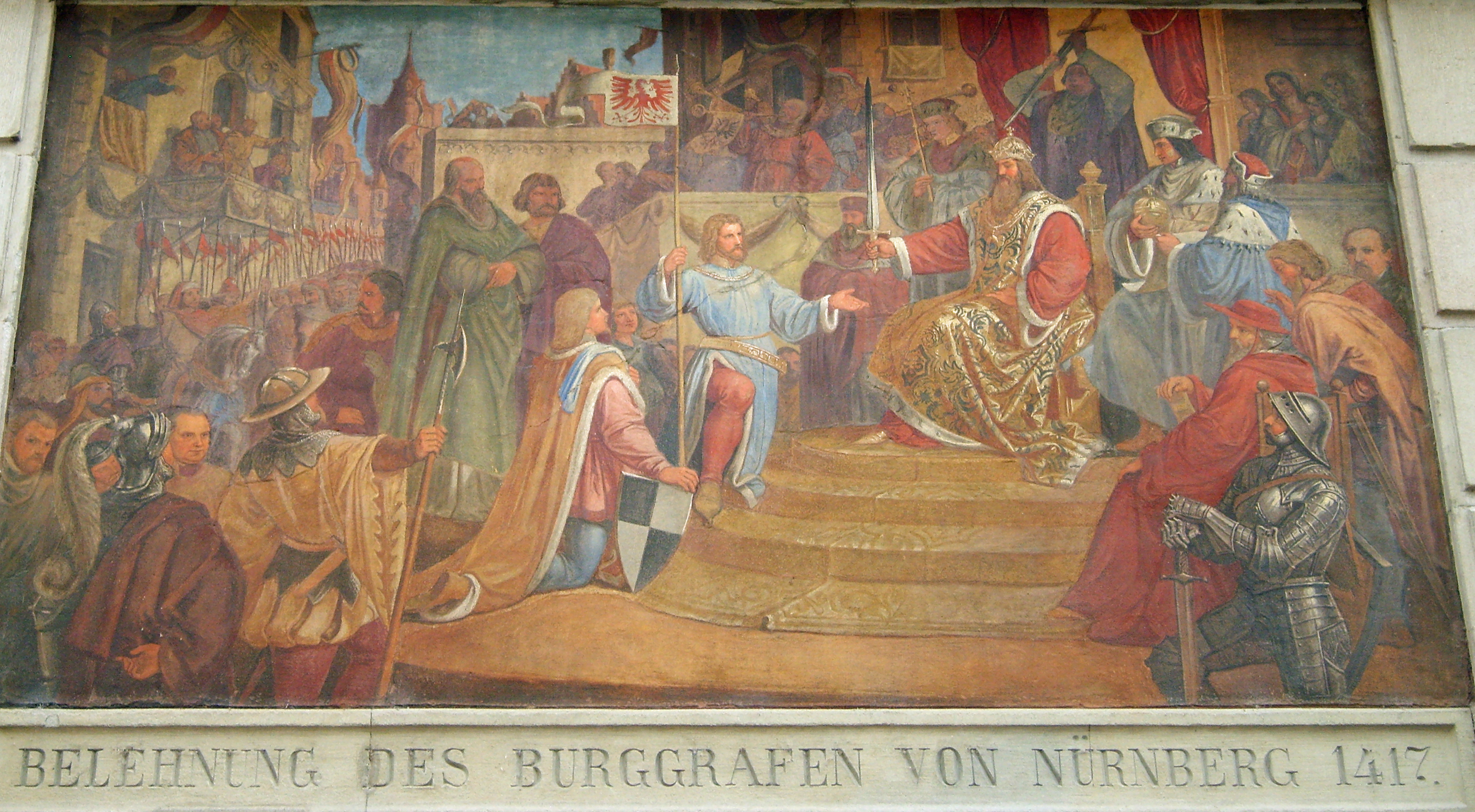 Konstanz Rathaus - Google Maps - Google Earth Burggraf Friedrich von Nürnberg wird in Konstanz mit der Mark Brandenburg belehnt